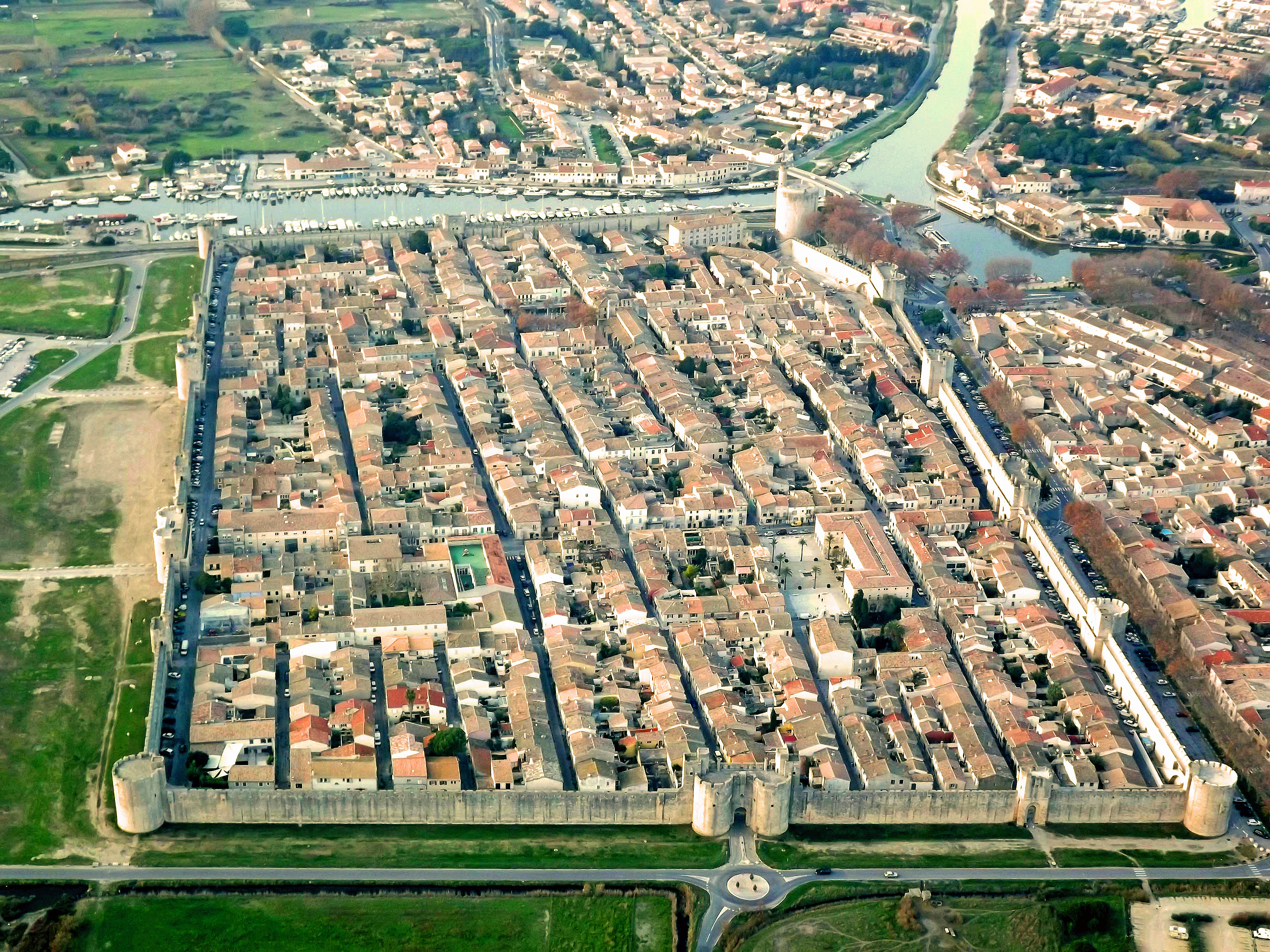 Vu aérienne de la ville d'Aigues Mortes